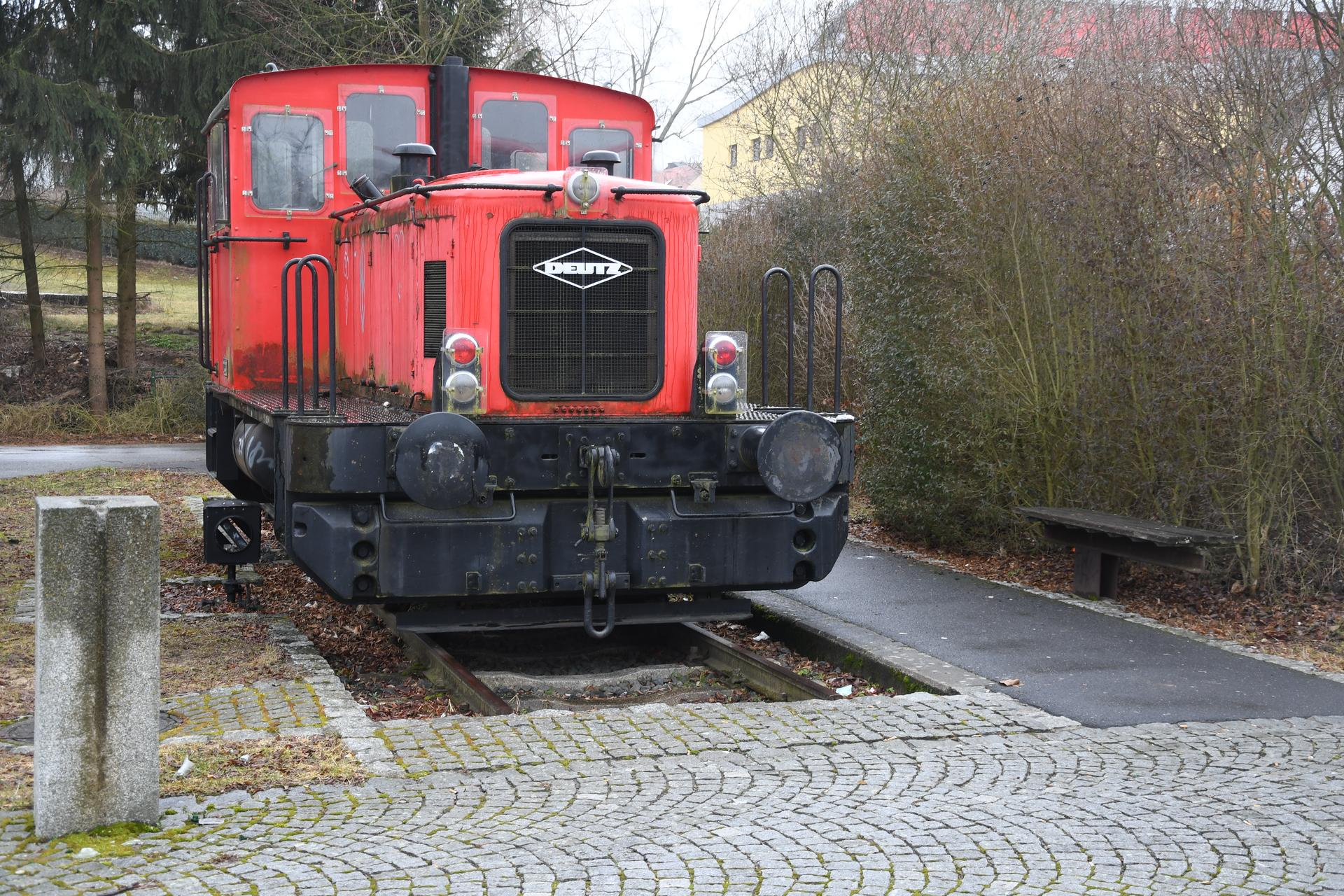 DenkmalLokBfErbendorfNord